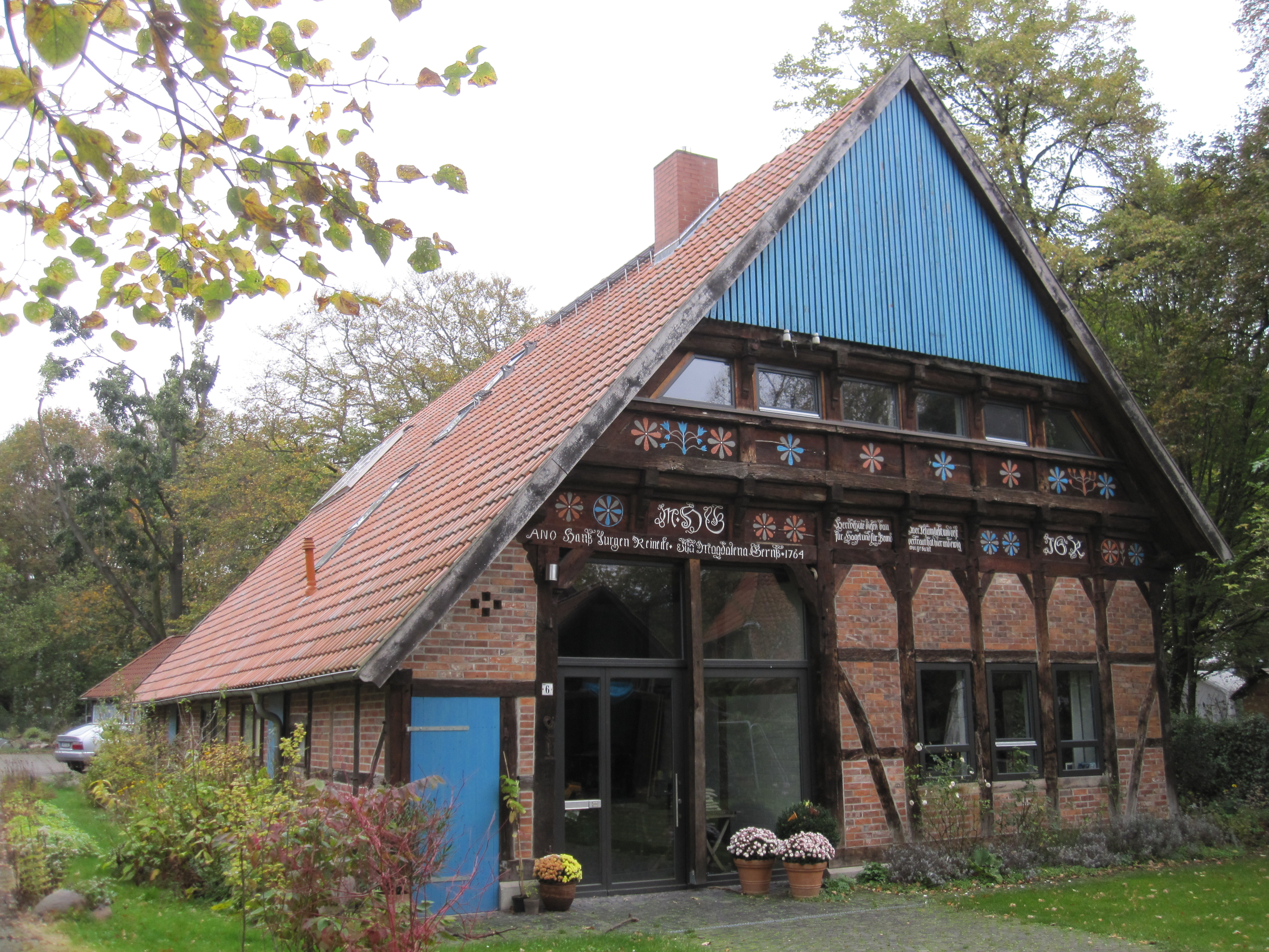 Hannover Buchholz-Kleefeld :Eine Durchfahrtscheune, bei der die Erntewagen vorn zum großen Tor („Grot Dör“) hinein und nach dem Abladen zum hinteren Tor wieder hinaus fahren konnten, bauten nach den Daten in den Außenbalken „ANO 1764“, also im Jahr (lateinisch „annus“, hier verwendet im Dativ „anno“ = im Jahr) 1764 „Hanß Jurgen Reinecke“ und seine Ehefrau „Ilsa Magdalena Gernß“. Sie ließen die Zimmerleute in die Zierfelder zwischen dem Balkenwerk schreiben „Herr behute diesen bau für Hagel und für Brand“ und „Wer Jesum liebt und vest vertraut hat hier und ewig wolgebaut“. Seit den 1920er Jahren diente die Scheune nicht mehr einem Landwirt. Ein in der Stadt Hannover tätiger Architekt, Ferdinand Möller, hatte sie zusammen mit dem ganzen bäuerlichen Anwesen gekauft. Nach dem Zweiten Weltkrieg wurde die Scheune von einer Tischlerei und als Lager für italienische Weine genutzt. Um das Jahr 2000 herum kamen Umnutzung und denkmalgerechter Umbau zu einem Wohnhaus. Die Beschriftung an den Außenbalken wurde von künstlerischer Hand aus dem Dornröschenschlaf von Jahrzehnten erweckt und erneuert. Die beiden großen hölzernen Toren an den Giebelseiten wurden durch Glaswand und Glastüren ersetzt. Nun kann der Bauer durch die Durchfahrtscheune hindurchschauen – auch bei geschlossenen Toren. Wat al‘ gifft!